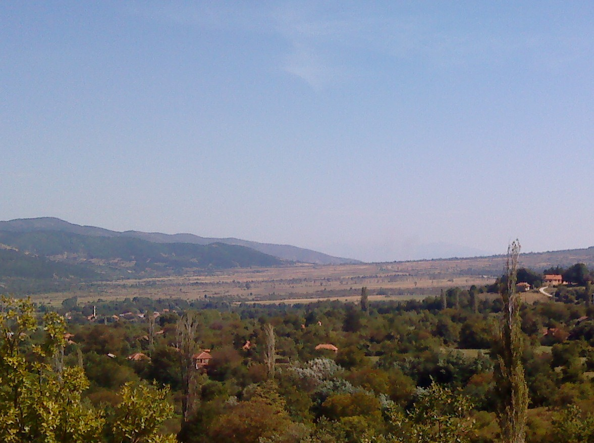 Село Ѓавато - Гулабова мала